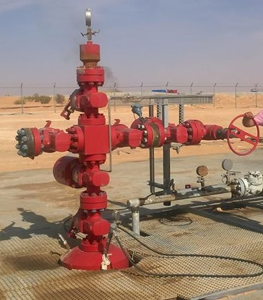 Tête de puits de pétrole à Al Tarfa [à 30 km de Douz sur la route qui mène vers Matmata]